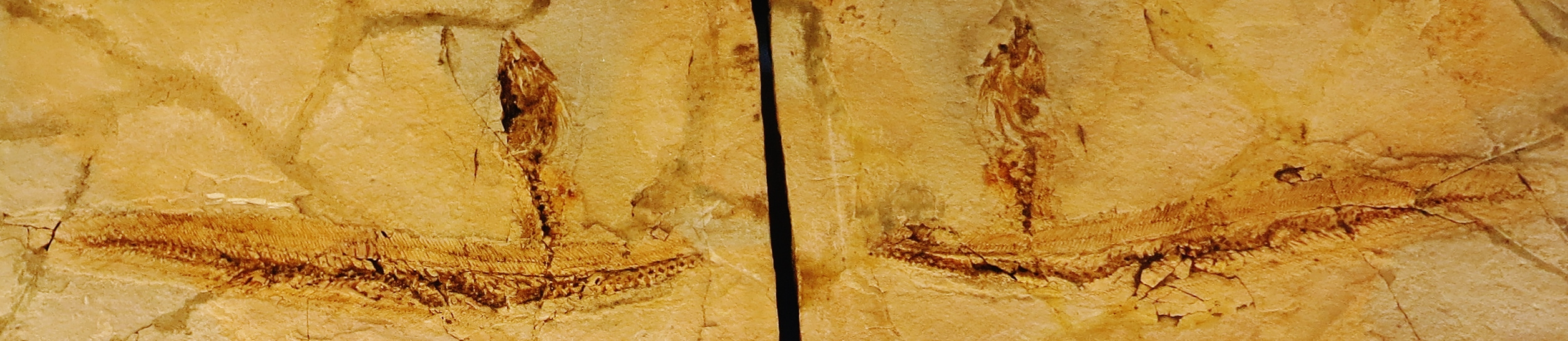 Fossil - Took the picture at Museo di storia naturale di Verona